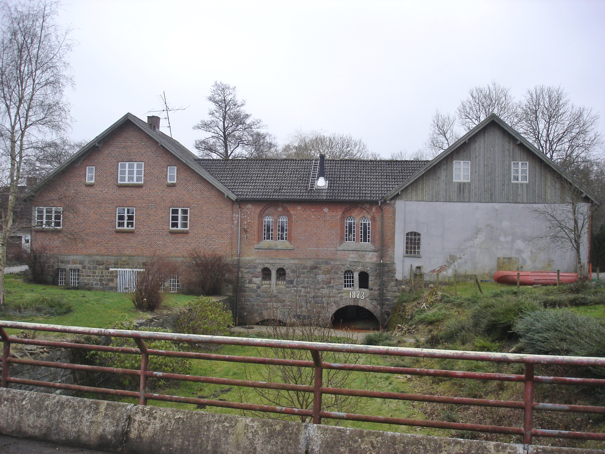 Haraldskær Fabrik med årstal 1873